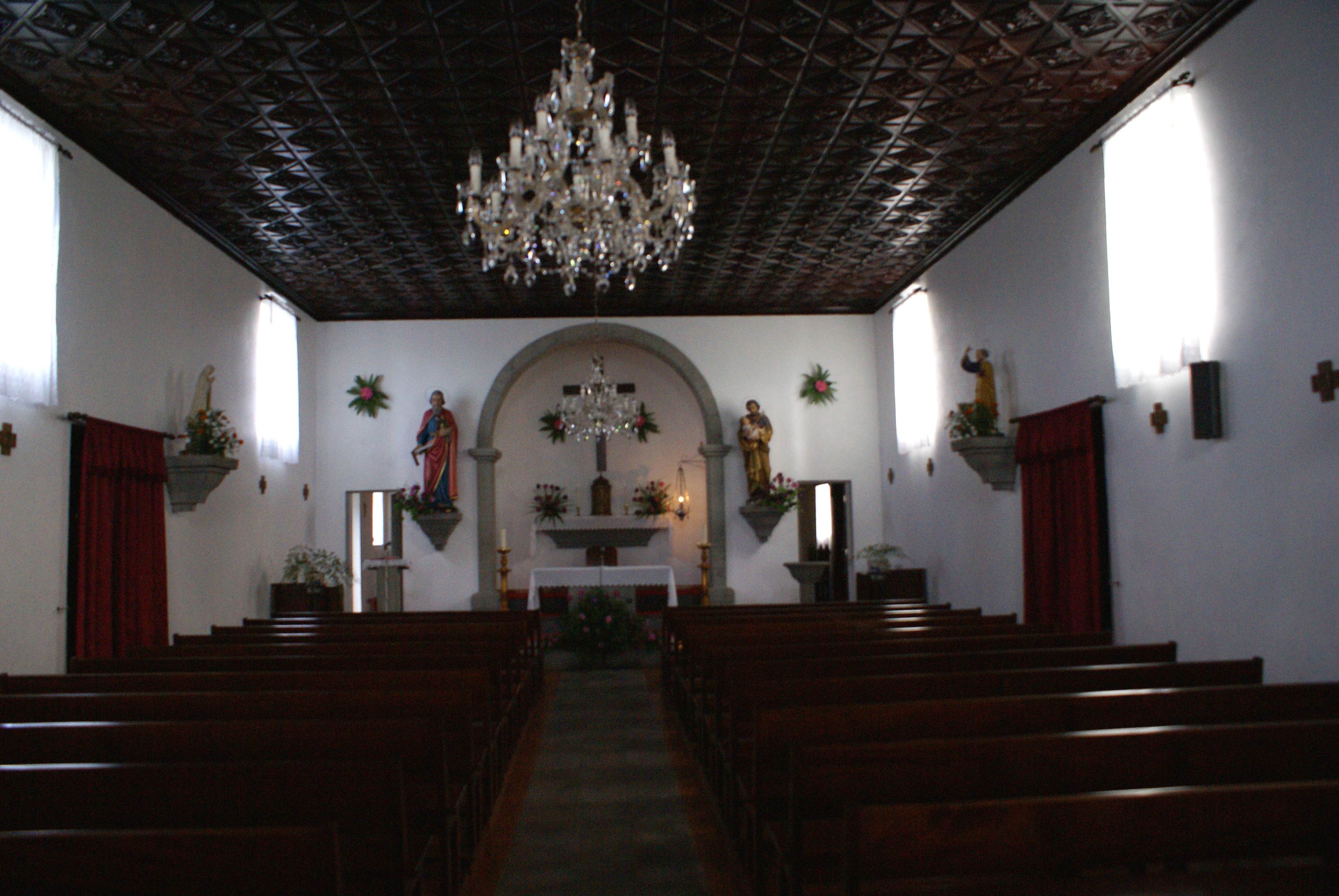 Ermida de São Tomé, interior, Calheta, ilha de São Jorge, Açores